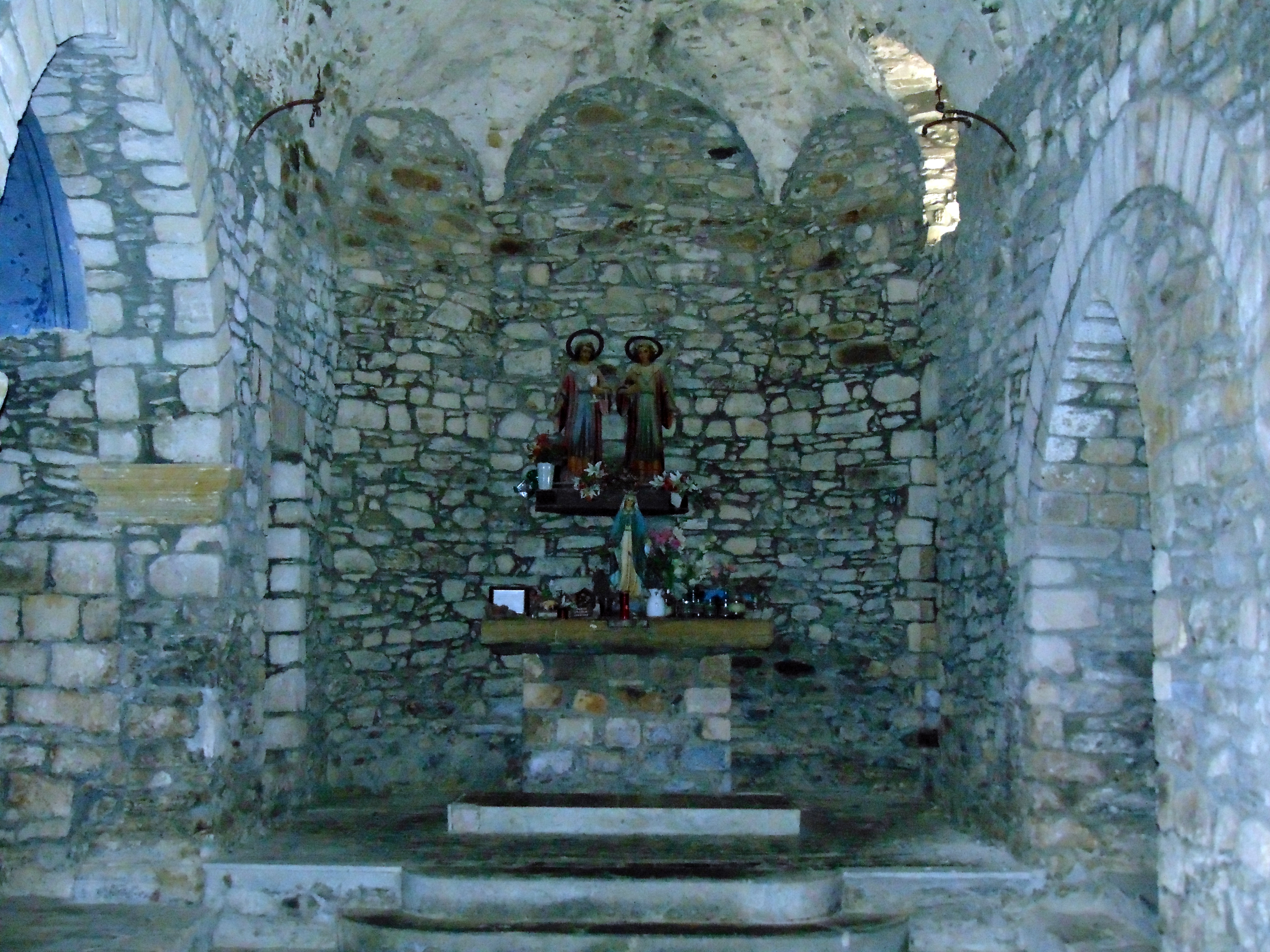 Sant Cebrià de Lledó (Cruïlles, Monells i Sant Sadurní de l'Heura)